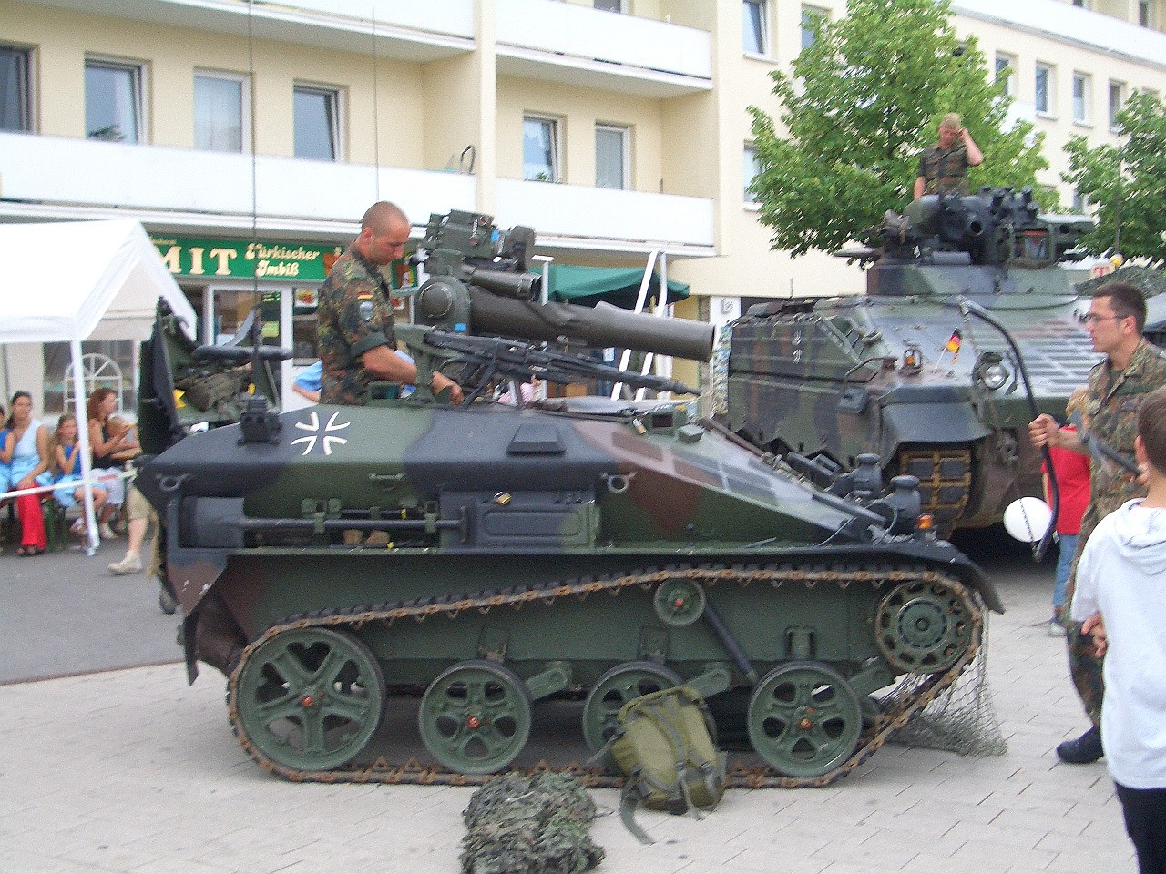 Im Vordergrund, Waffenträger Wiesel 1A1 TOW (mit MG3) und dahinter ein Schützepanzer Marder 1A3.